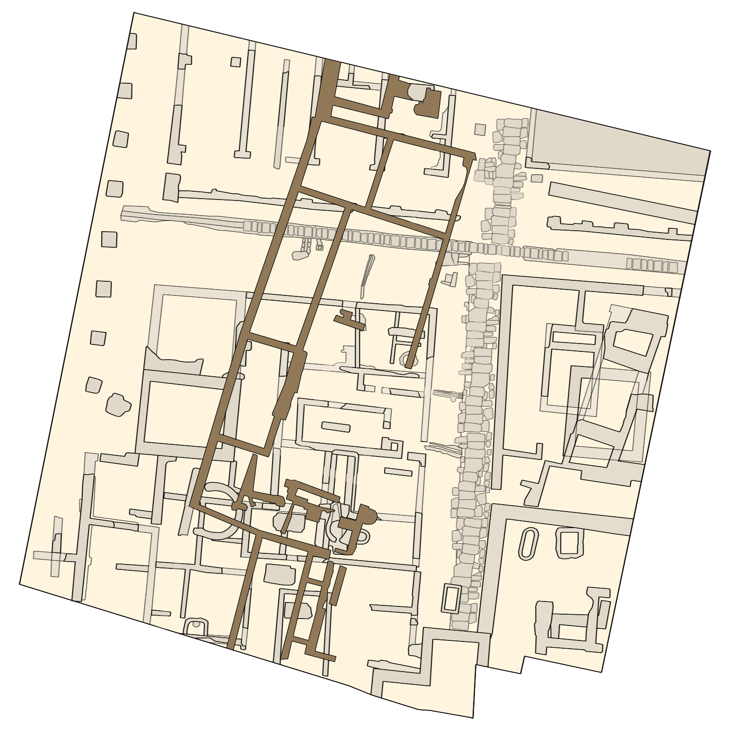 Plano de los restos arqueológicos del Museo de la Almoina. Superposición de la antigua almoina derribada. Plaza de la Almoina, Valencia, Comunidad valenciana, España.